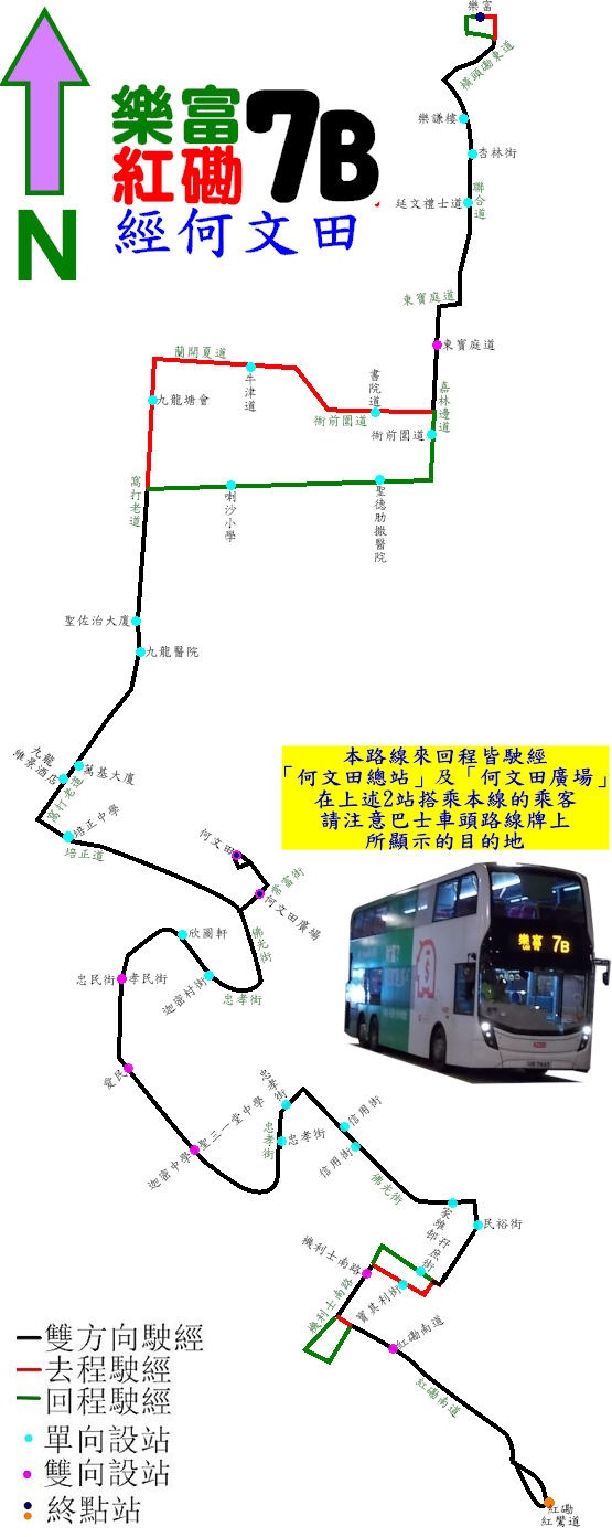 中文（香港）: 九巴7B線的走線圖